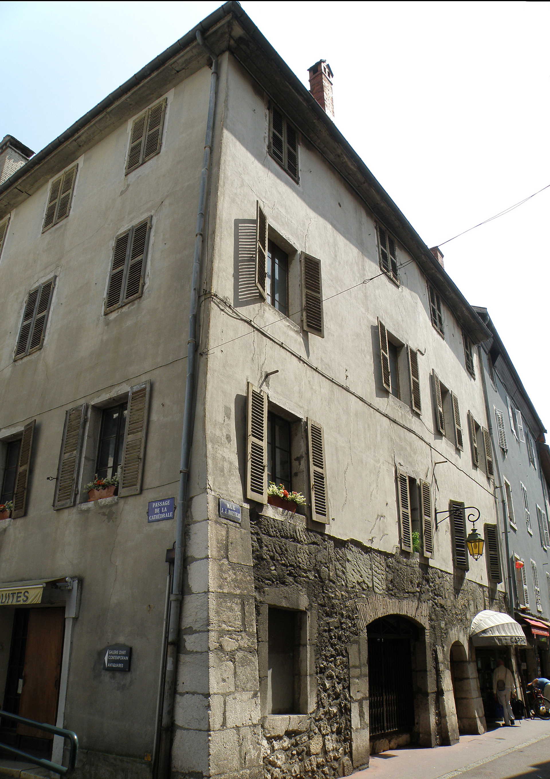 Annecy, ville et préfecture du département de la Haute-Savoie (région Rhône-Alpes, France). Rue Jean-Jacques Rousseau, angle rue de la Cathédrale, dans la vieille ville.